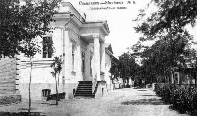 Славянск на дореволюционной открытке. №8. Грязе-лечебные ванны.